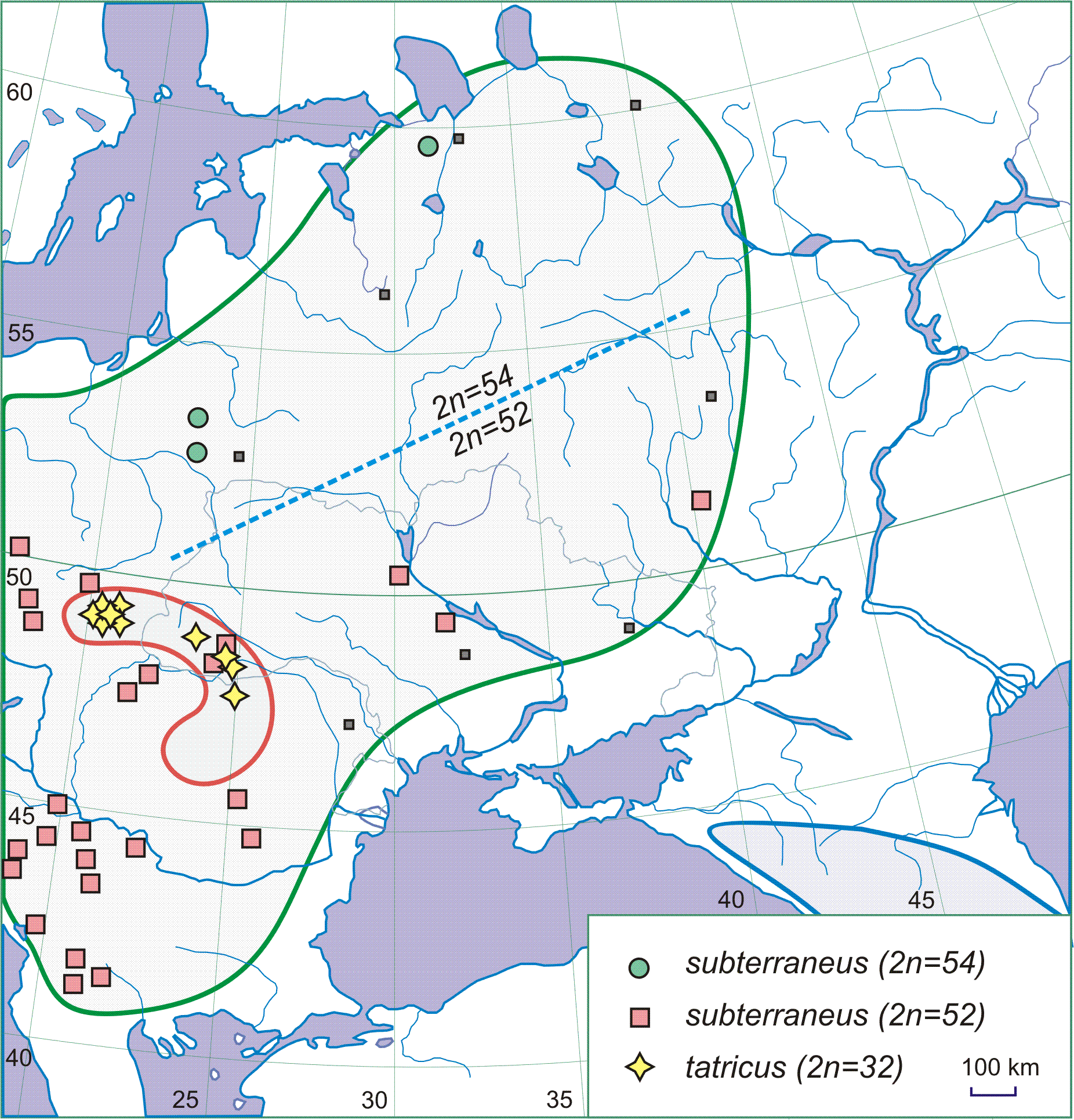 ranges of Terricola species in Eastern Europe: map of Terricola species ranges in Eastern Europe from article by Zagorodniuk, 2005 (Sci. Bull. Uzhgorod Univ., 2005)